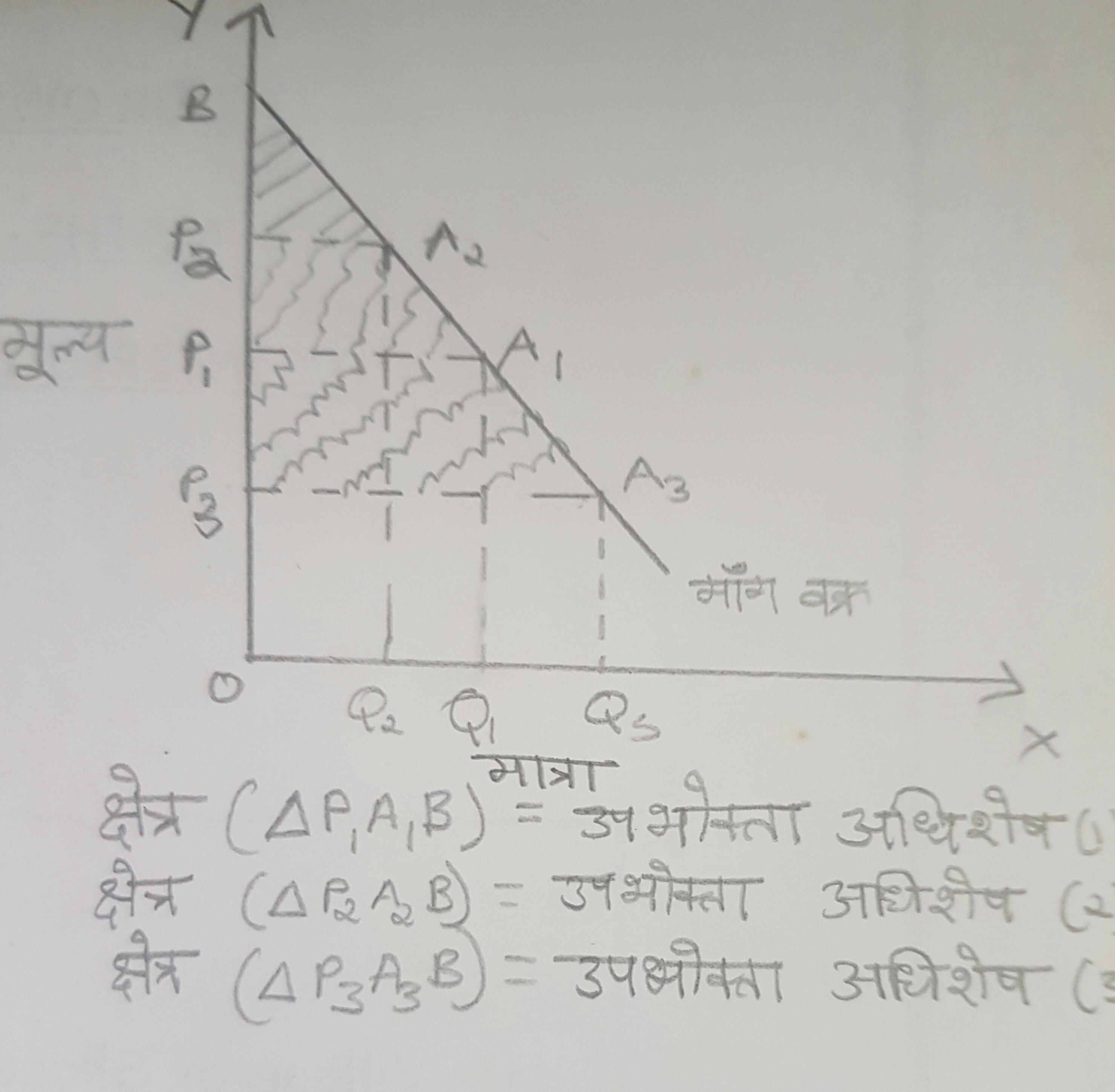 उपभोक्ता अधिशेष पर कीमत का प्रभाव का प्रतिनिधित्व